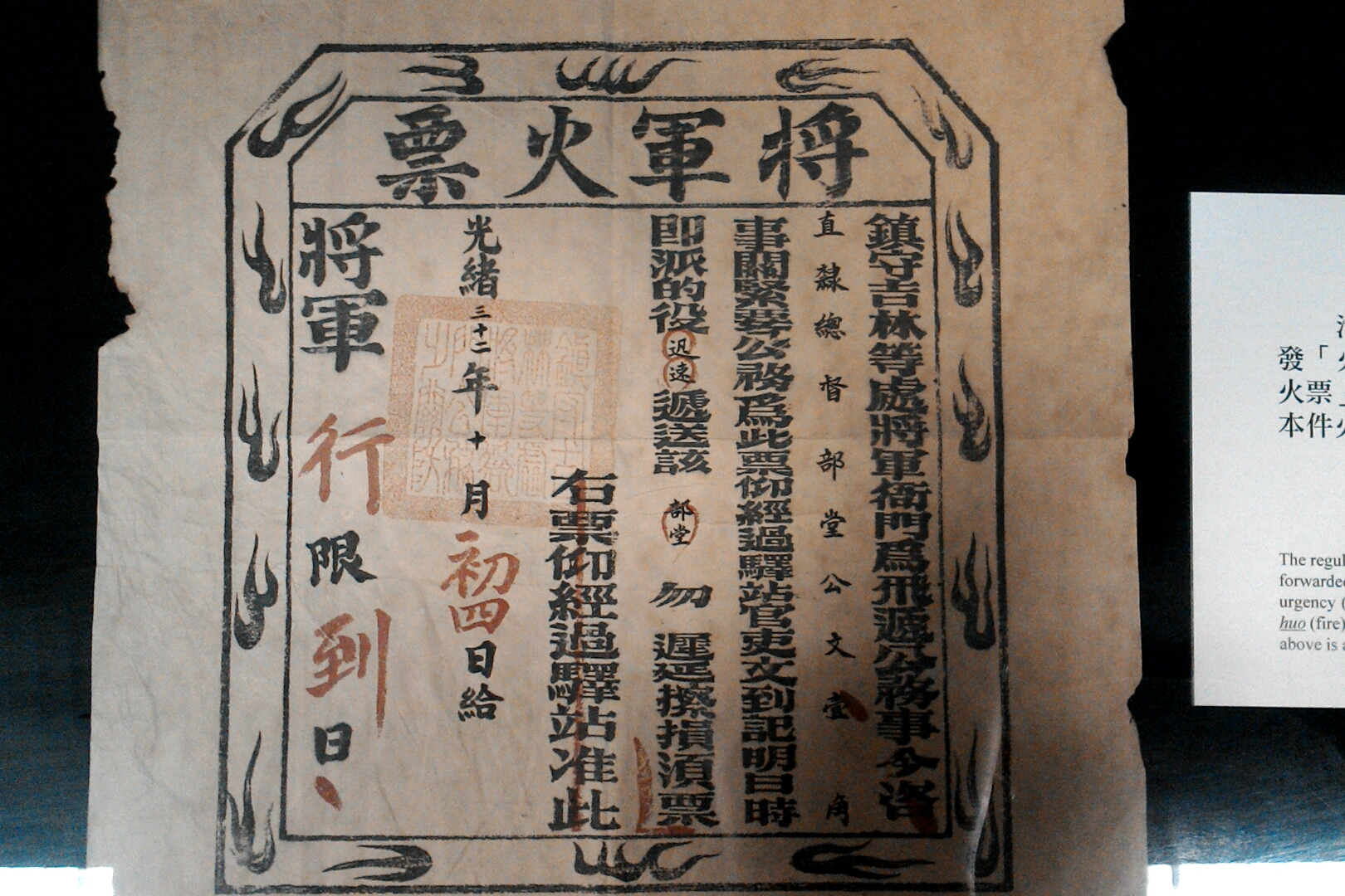 光緒三十二年十月初四鎮守吉林等處將軍火票,台北市中正區南門次分區龍福里